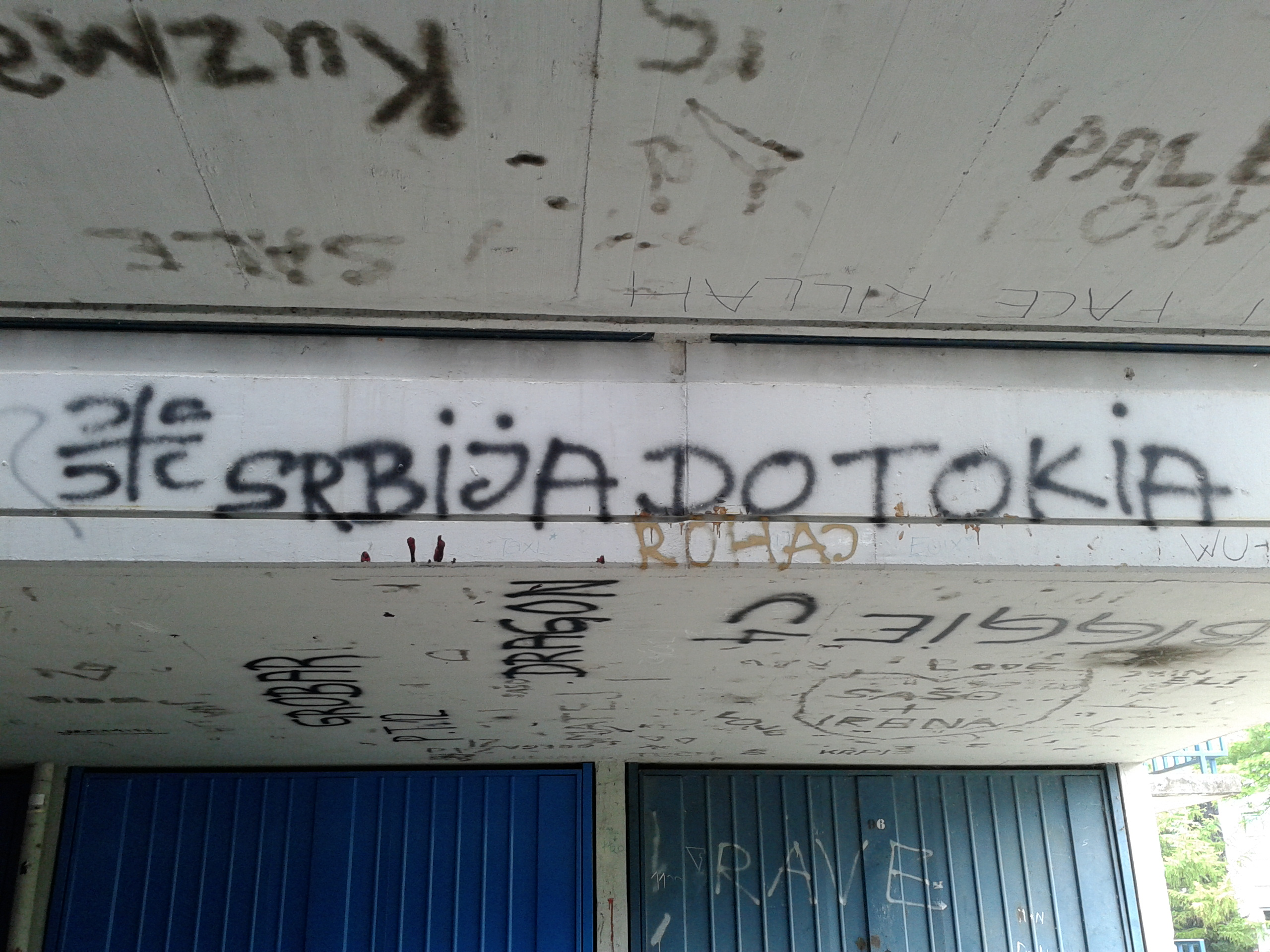 Nationalistic graffiti in Fužine garage complex